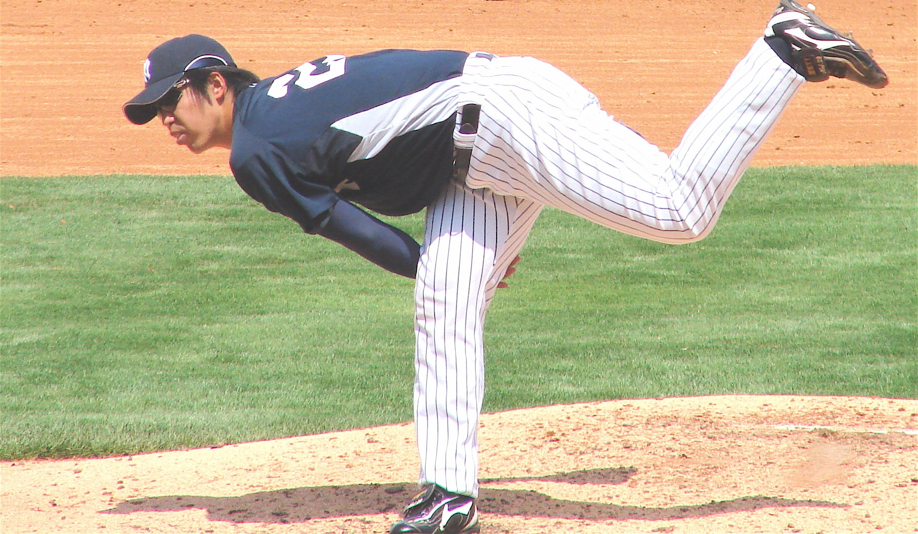 井川慶 / Kei Igawa